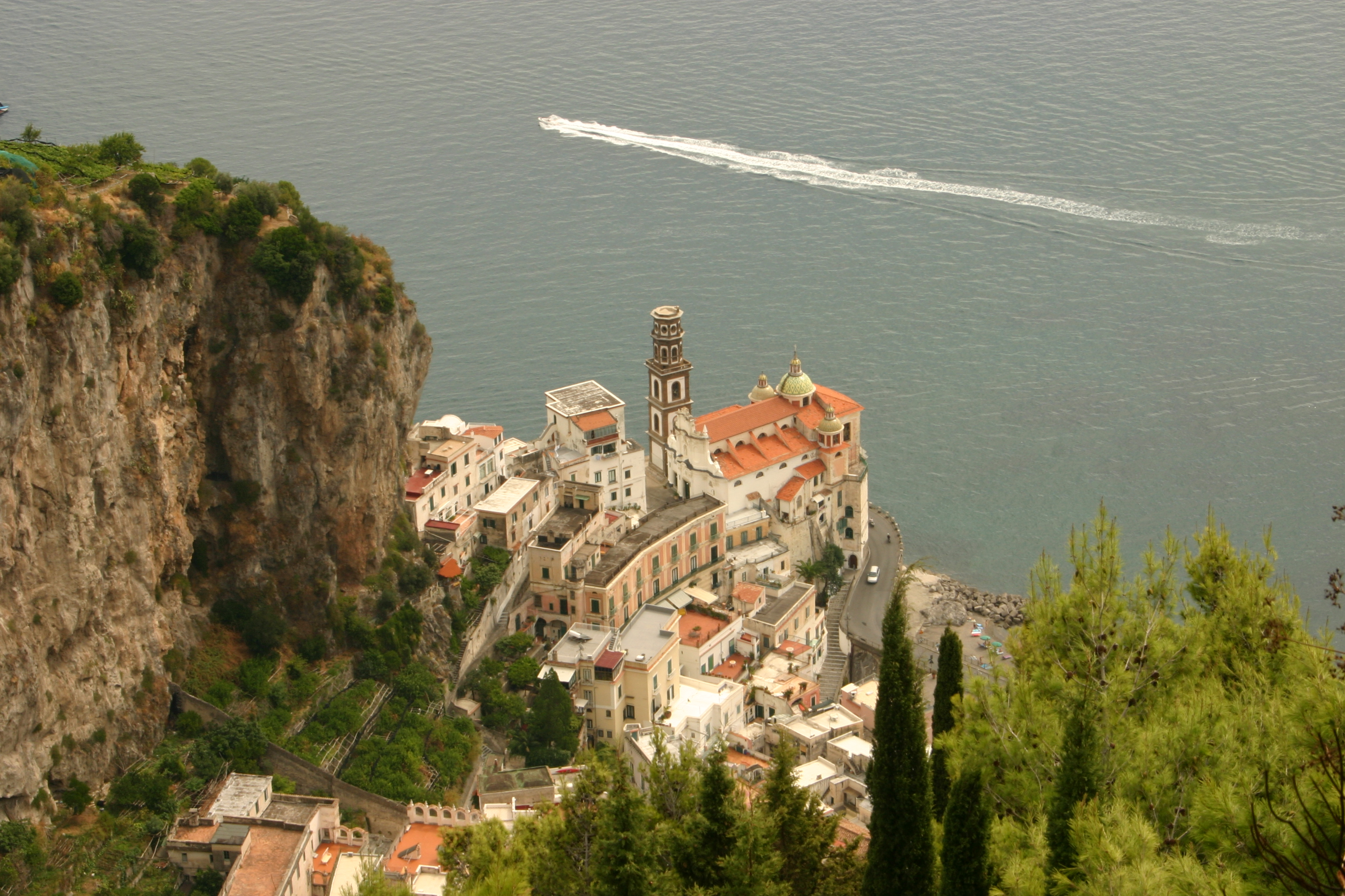 415 Amalfi Day 13